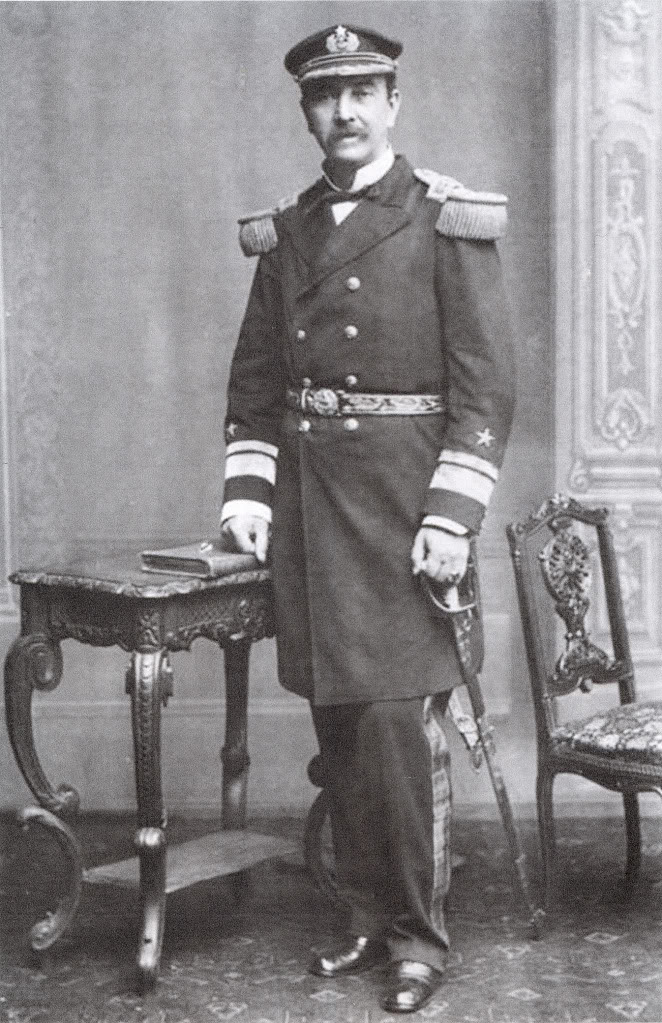 Patricio Lynch, vicealmirante de la Armada de Chile. Comandante de la 1ª. División del Ejército chileno en las batallas de Chorrillos y Miraflores.